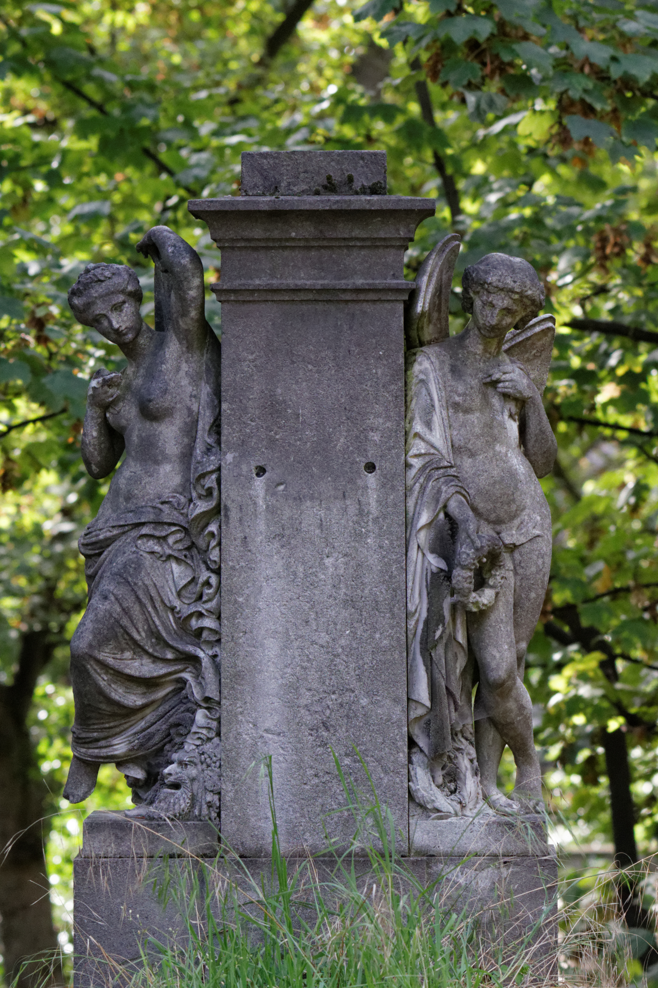 Sépulture de Louis-Antoine Duport (1781-1853), danseur et maître de ballet. Monument comportant deux statuettes signées J. Petit, 1855 et à l'origine un buste en bronze.